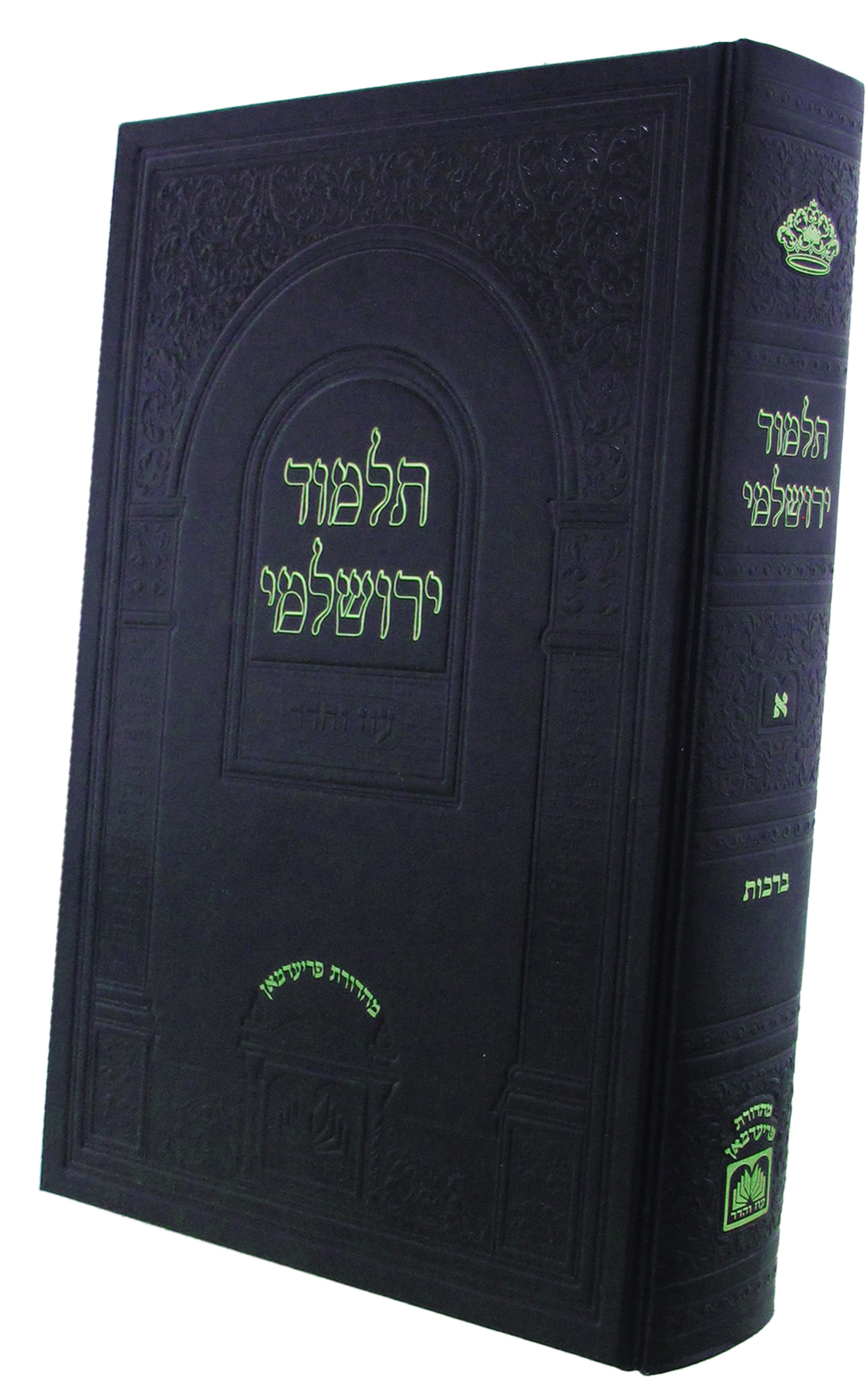 עטיפת תלמוד ירושלמי עוז והדר